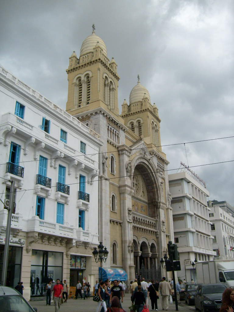 Vue de la cathédrale Saint-Vincent-de-Paul à Tunis